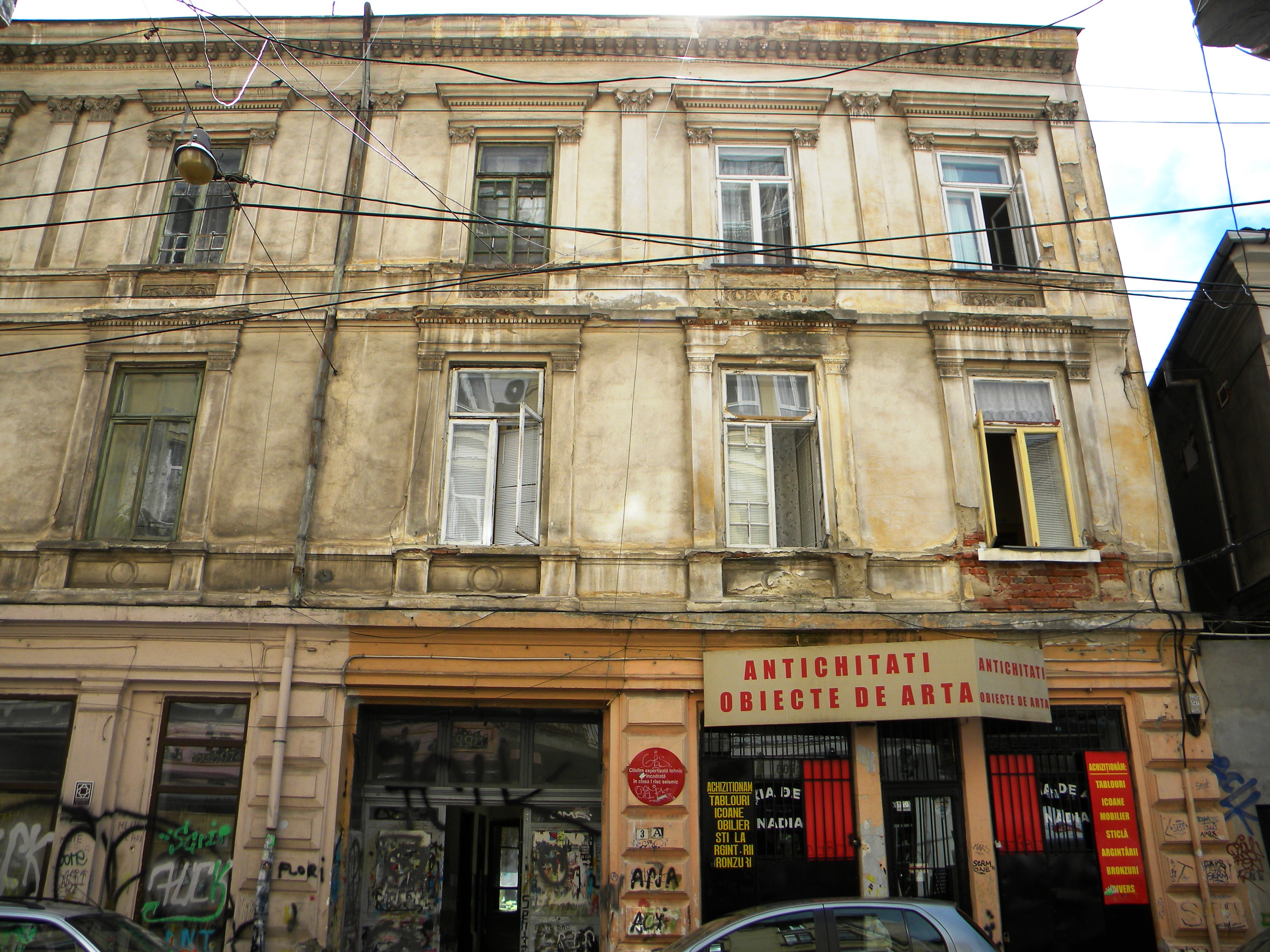 Bucuresti, Romania, Strada Blanari nr. 3, sect. 3 (casa)